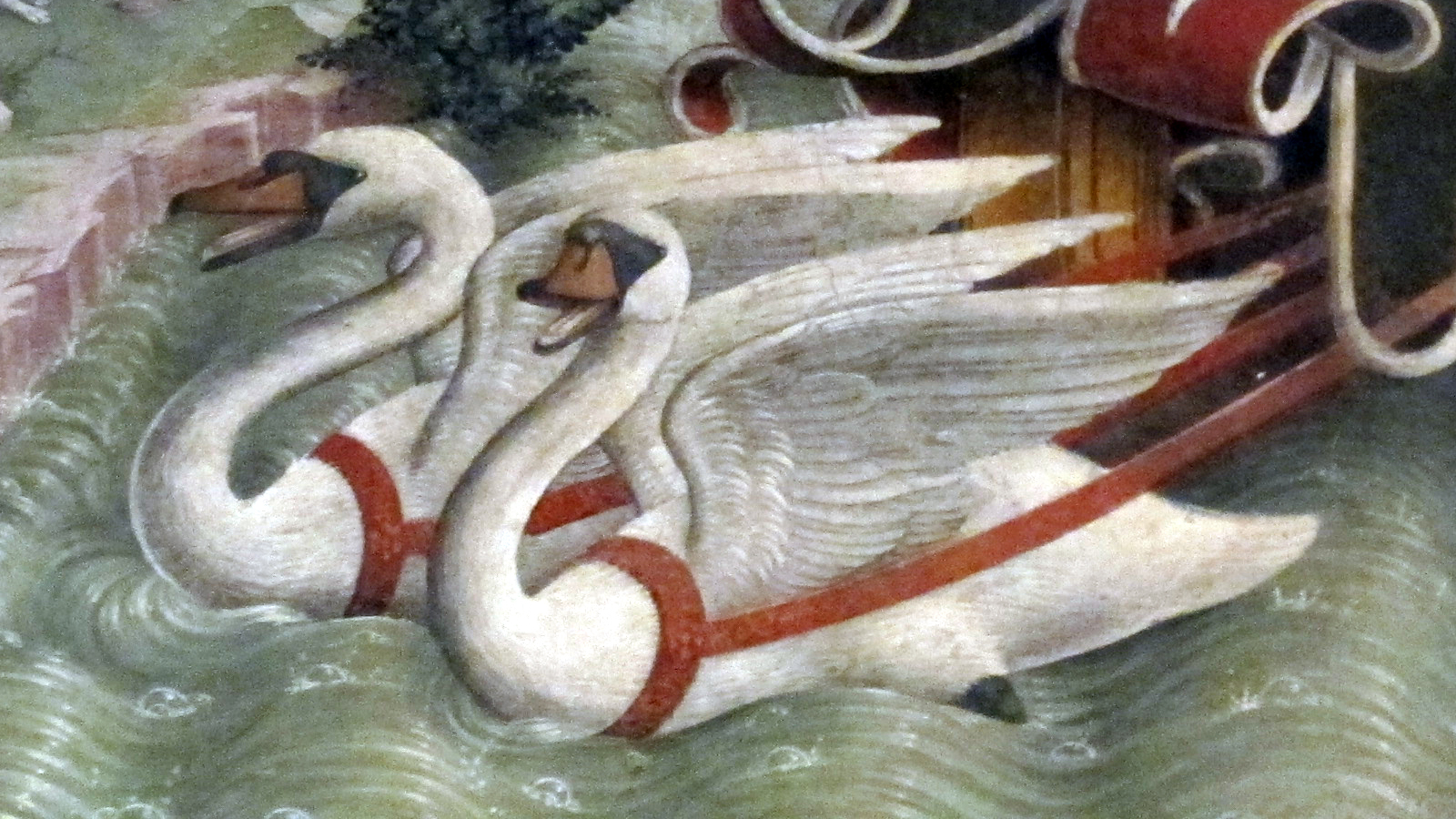 Palazzo Schifanoia This is a photo of a monument which is part of cultural heritage of Italy.